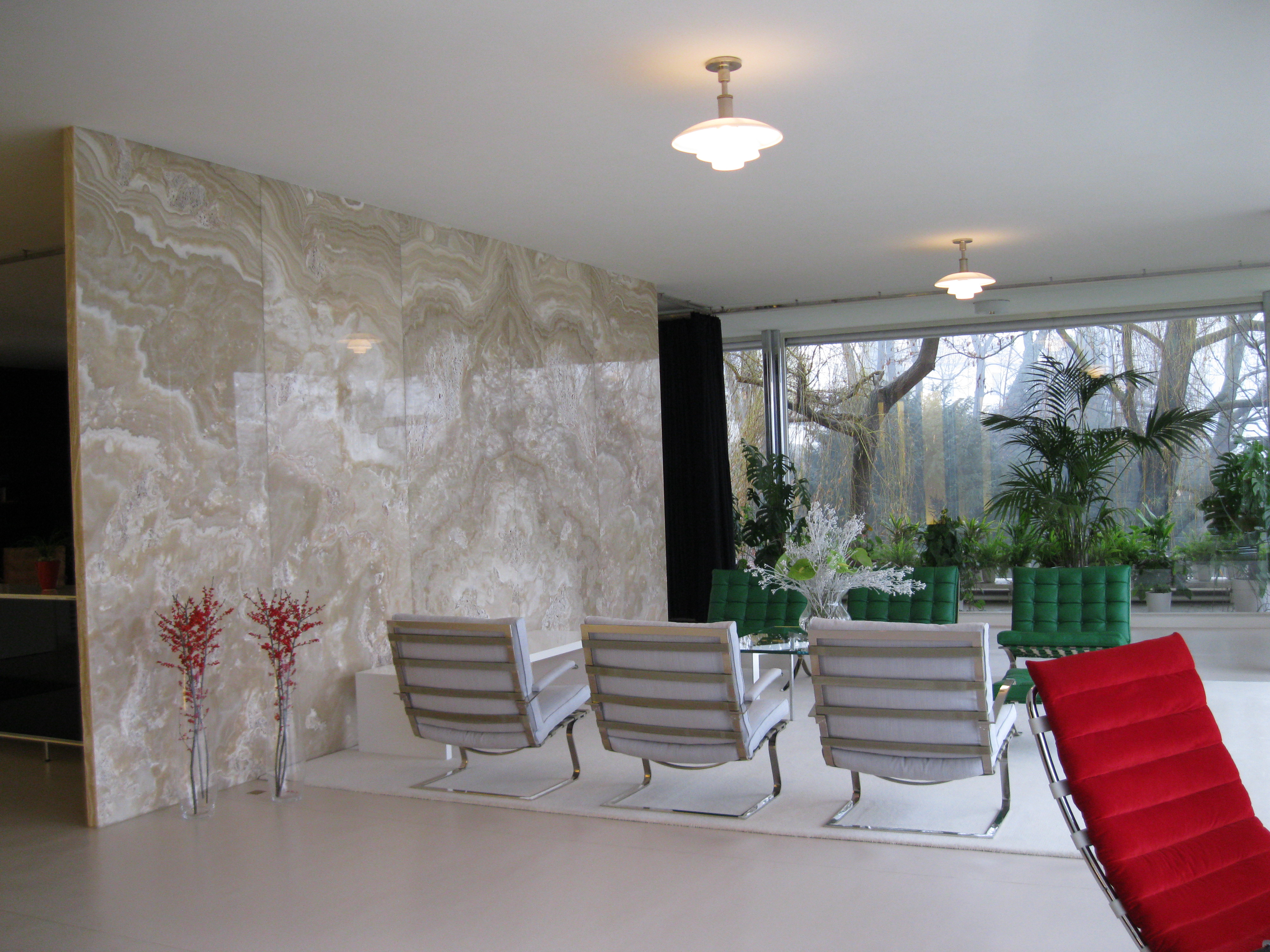 Vila Tugendhat (Brno), Černá Pole, Černopolní 237/45, Brno